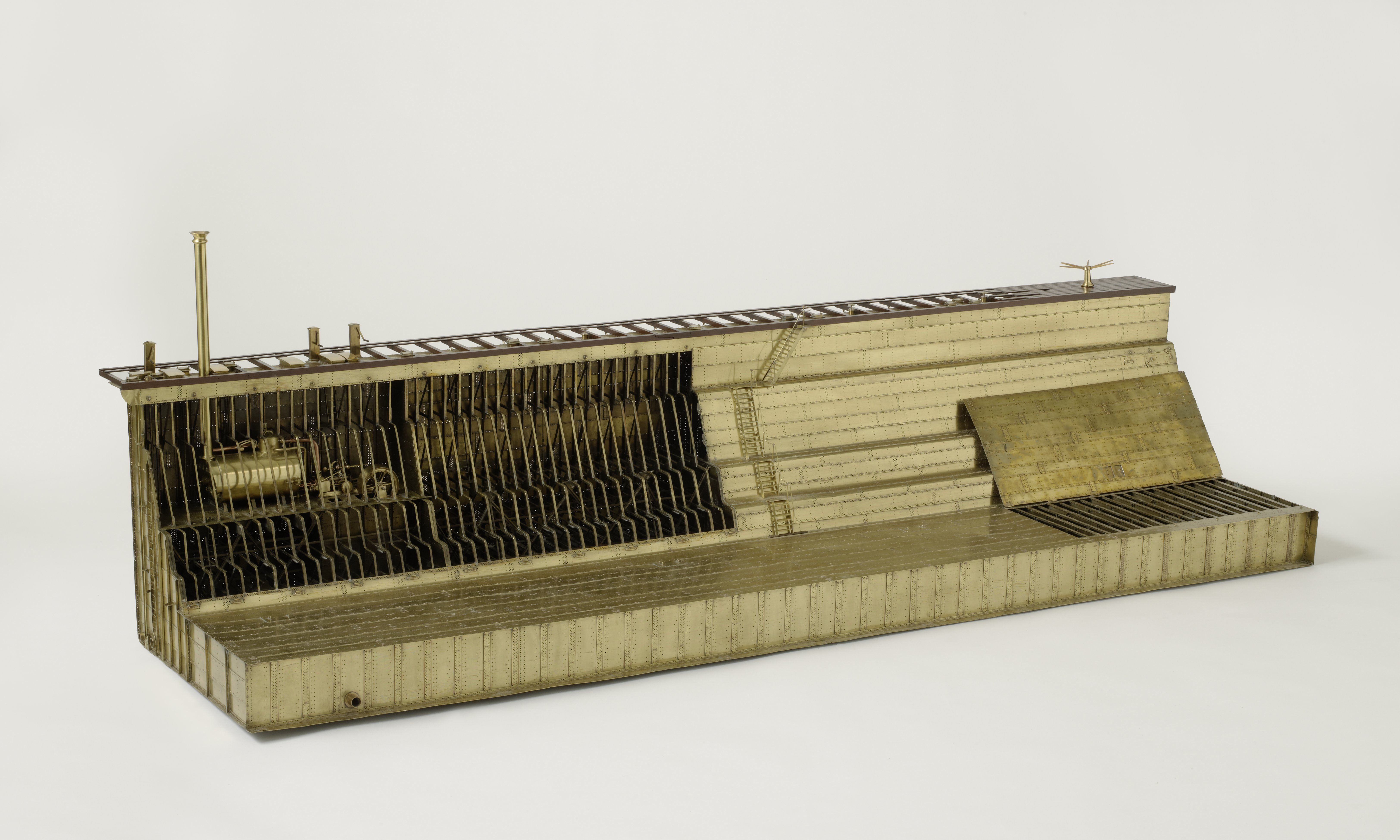 IdentificatieTitel(s): Model van een deel van een drijvend dokObjecttype: schaalmodel demonstratiemodel Objectnummer: NG-MC-1187Omschrijving: Het dok bestond uit twee helften, terwijl het model een gedeelte van één helft voorstelt. Het is geheel van messing gemaakt, de constructie bestaande uit spanten van hoekijzer, versterkt met diagonaalverbanden en plaatwerk. Schotten verdelen het geheel in waterdichte compartimenten, die men vol laat lopen om het dok te laten zinken. Het model heeft een stoommachine onder het bovendek, een stoomketel en twee centrifugaalpompen voor het leegpompen. De schoren voor het schip zijn op het model niet aangegeven. Schaal 1:25 (schaal op model).VervaardigingVervaardiger: modelmaker: Koninklijke Fabriek P. van Vlissingen & Dudok van Heelnaar ontwerp van: August Elize Trompnaar ontwerp van: J. StrootmanPlaats vervaardiging: modelmaker: Amsterdamnaar ontwerp van: Nederlandnaar ontwerp van: NederlandDatering: 1863 - 1864Fysieke kenmerken: messingMateriaal: messing Afmetingen: h 44,5 cm. × b 201 cm. × d 50,5 cm. ToelichtingHet ijzeren drijvende droogdok, Waar: naar dit model gemaakt is, werd in 1863-1864 door de Koninklijke Fabriek voor Stoom- en andere Werktuigen Paul van Vlissingen & Dudok van Heel in Amsterdam op last van de Nederlandse regering gemaakt. Het was 90 m lang en had een draagvermogen van 3000 ton. In 1864 werd het uiteengenomen en verscheept naar Soerabaya, waar het weer in elkaar gezet werd en naar het eiland Onrust gesleept om daar de houten droogdokken te vervangen. Eind jaren 1870 werd het versleten beschouwd en vervangen door een nieuw ijzeren drijvend dok (zie NG-MC-1411). Het model is in 1867-1868 tentoongesteld op de Wereldtentoonstelling te Parijs.Verwerving en rechtenVerwerving: overdracht van beheer 1883Copyright: Publiek domein